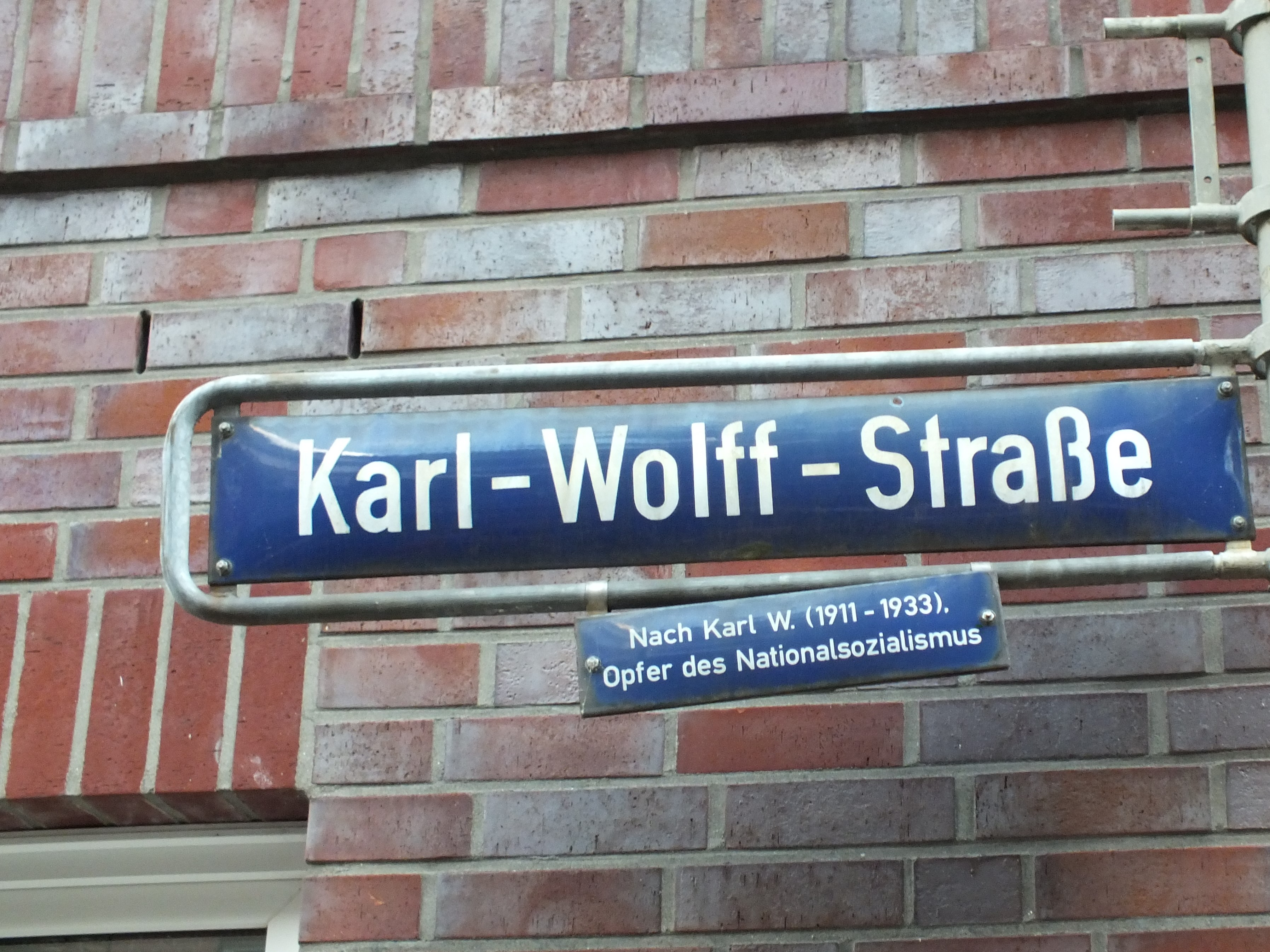 Straßenschild Karl Wolff-Straße in Hamburg-Ottensen